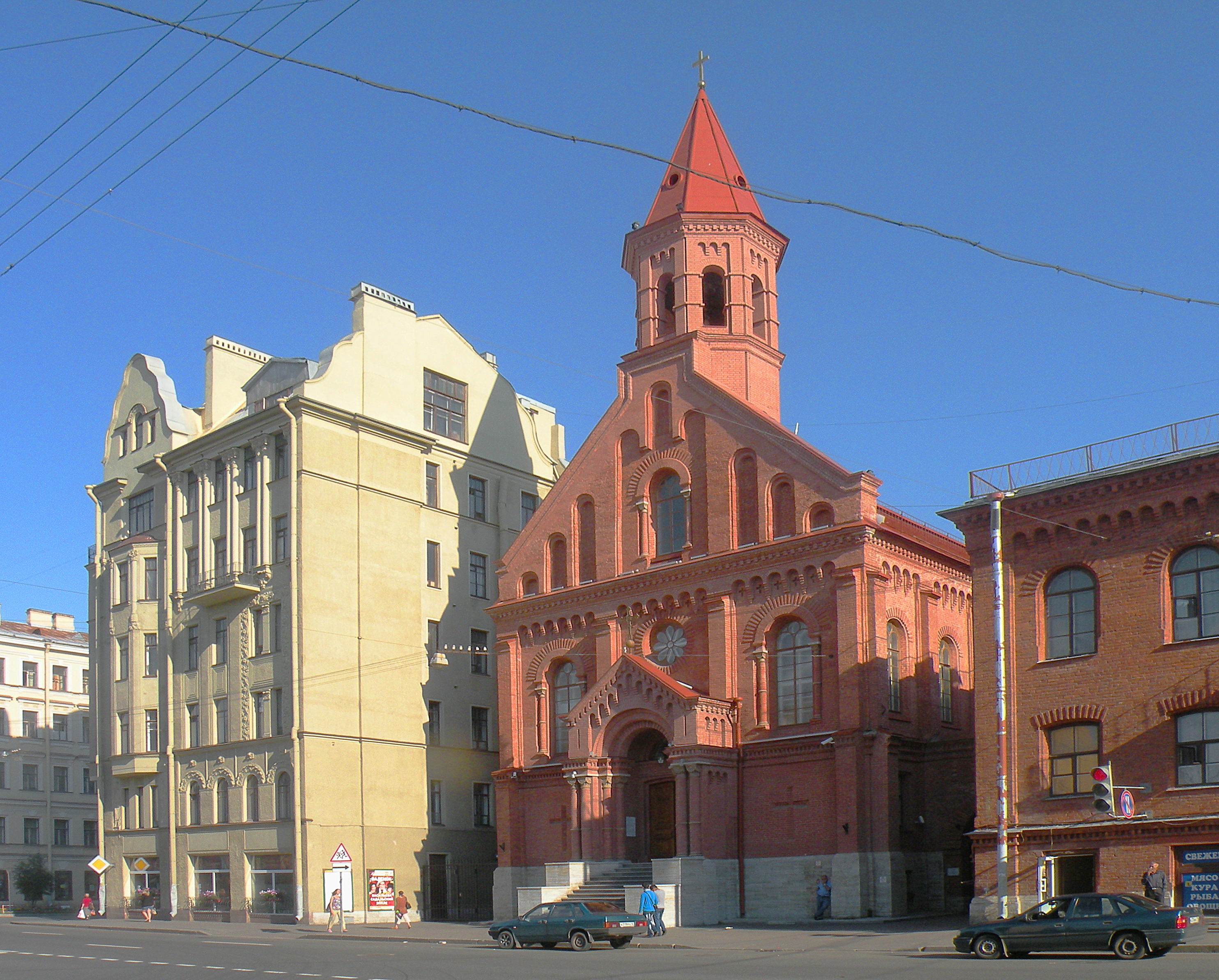 Боссе Гаральд Андреевич (1812 - 1894) St.John church. St.Petersburg.Decembrist street. 54